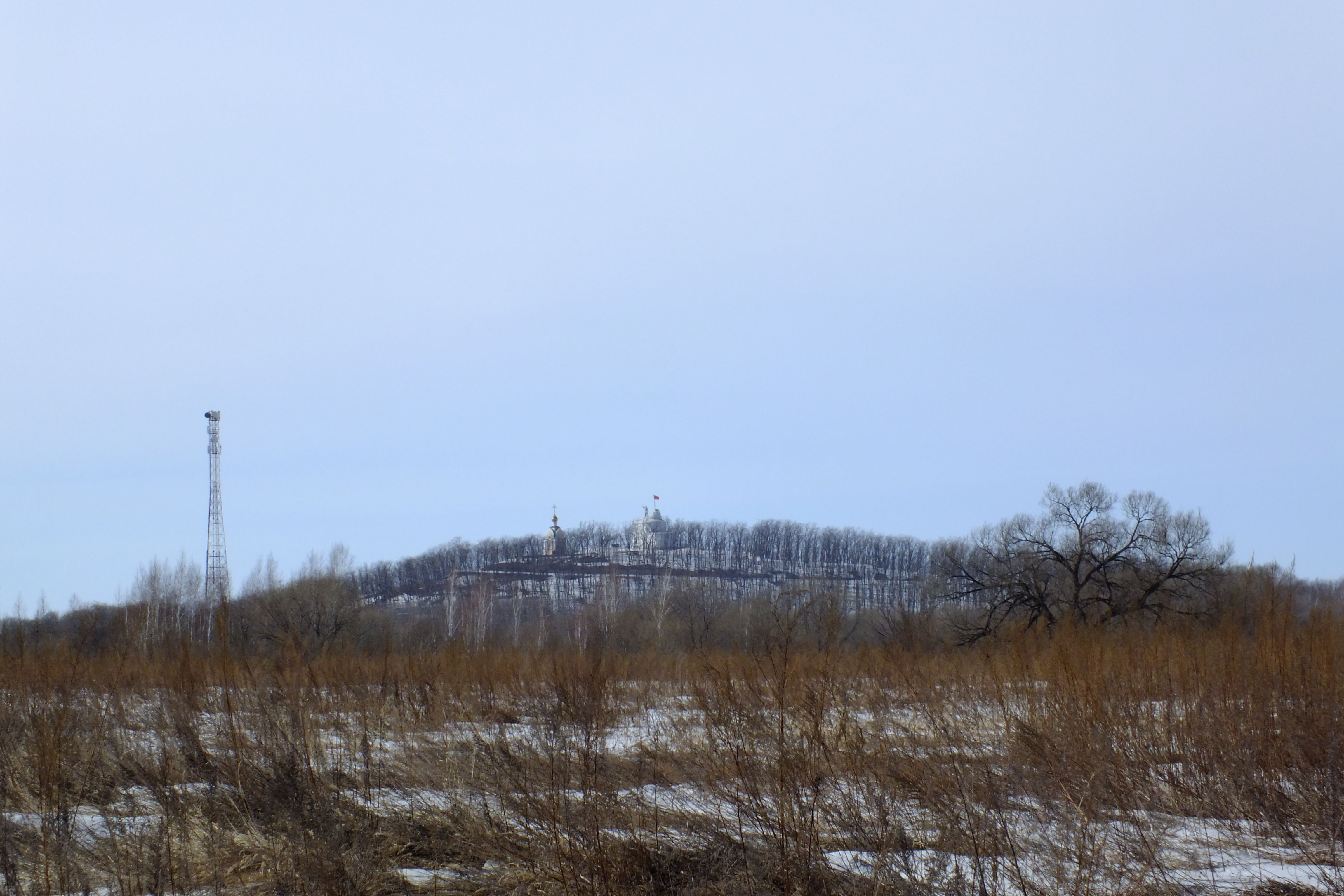 Volochaevka-1